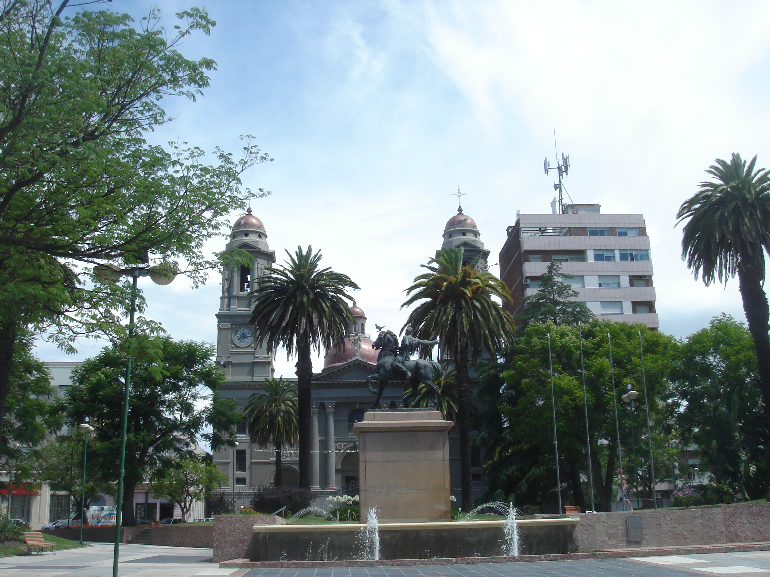 Monumento al Gaucho de Asencio y la Catedral Nuestra Señora de las Mercedes